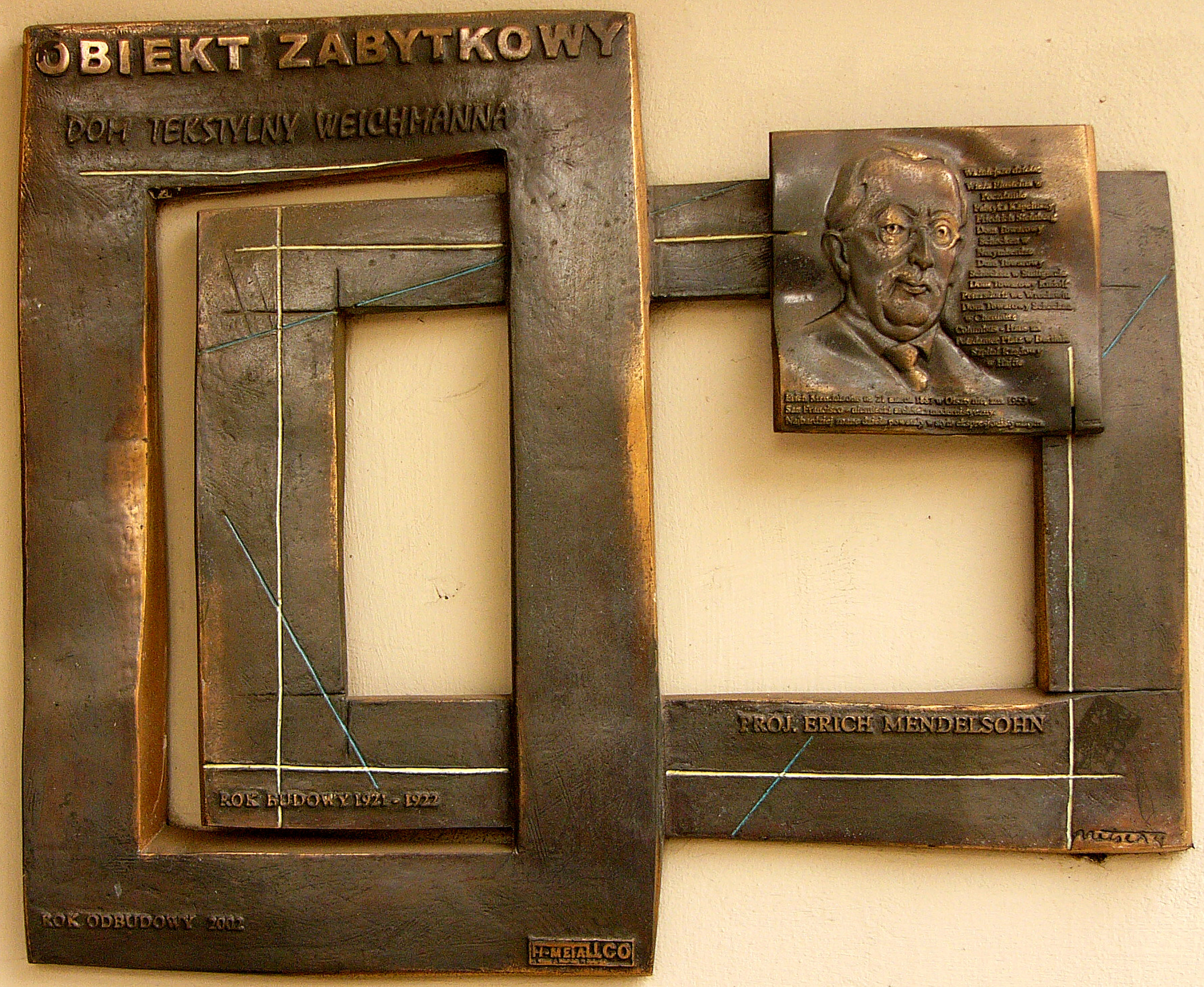 Plakette "Denkmal geschütztes Haus" am ehemaligen Seidenhaus Weichmann in Gleiwitz.